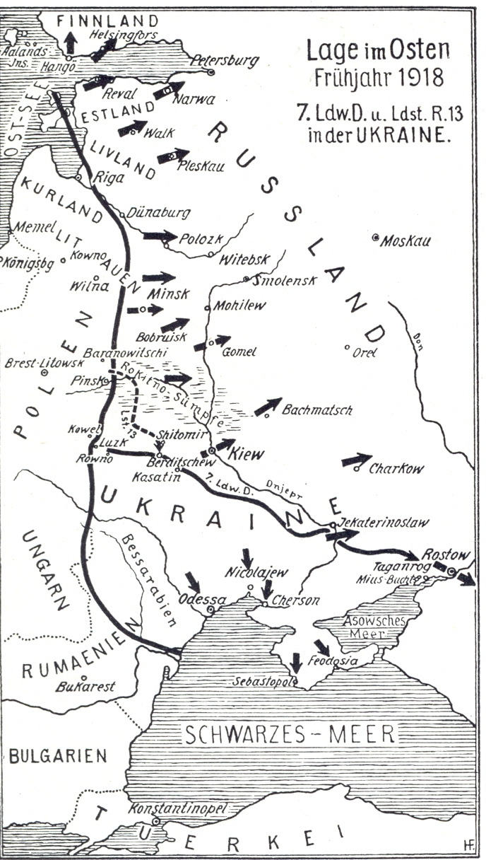 Karte: Lage im Osten Frühjahr 1918